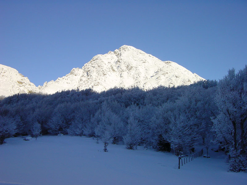 Vivario (Corsica) - Monte d'Oro